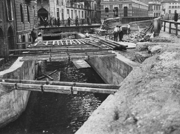 copertura del tratto di Naviglio di San Marco (milano)